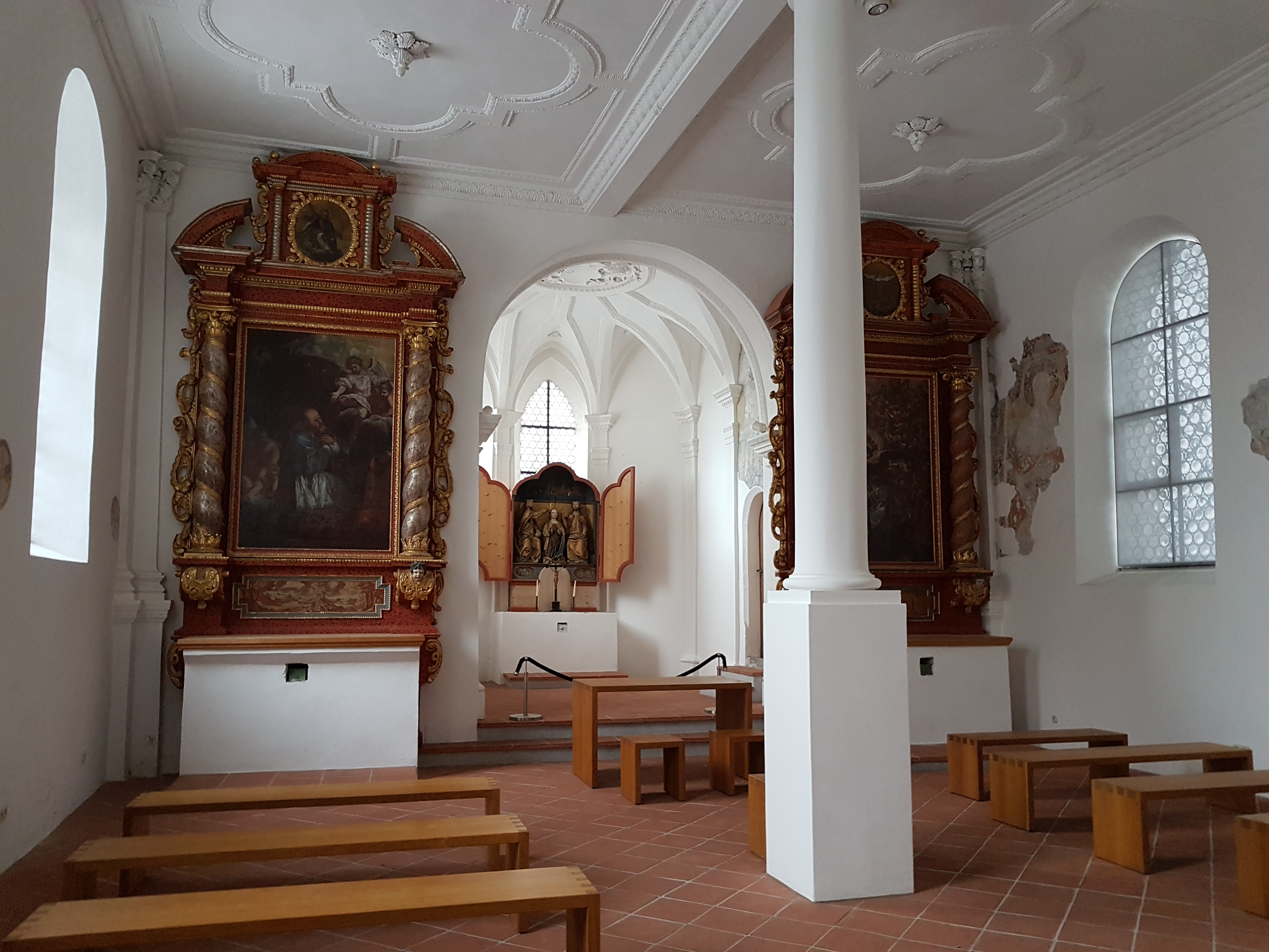 Hohes Schloss (Füssen), Veitskapelle